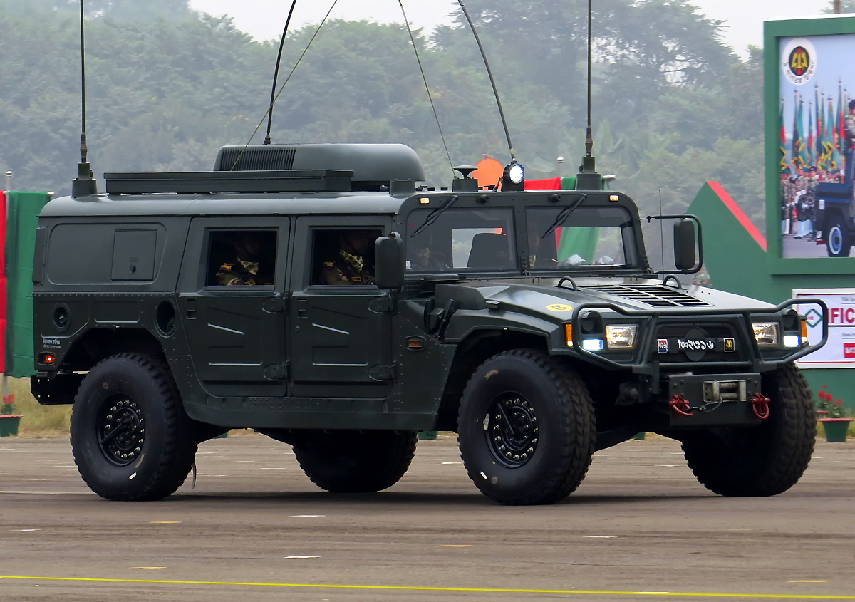 VGTJ/VDP 2015.